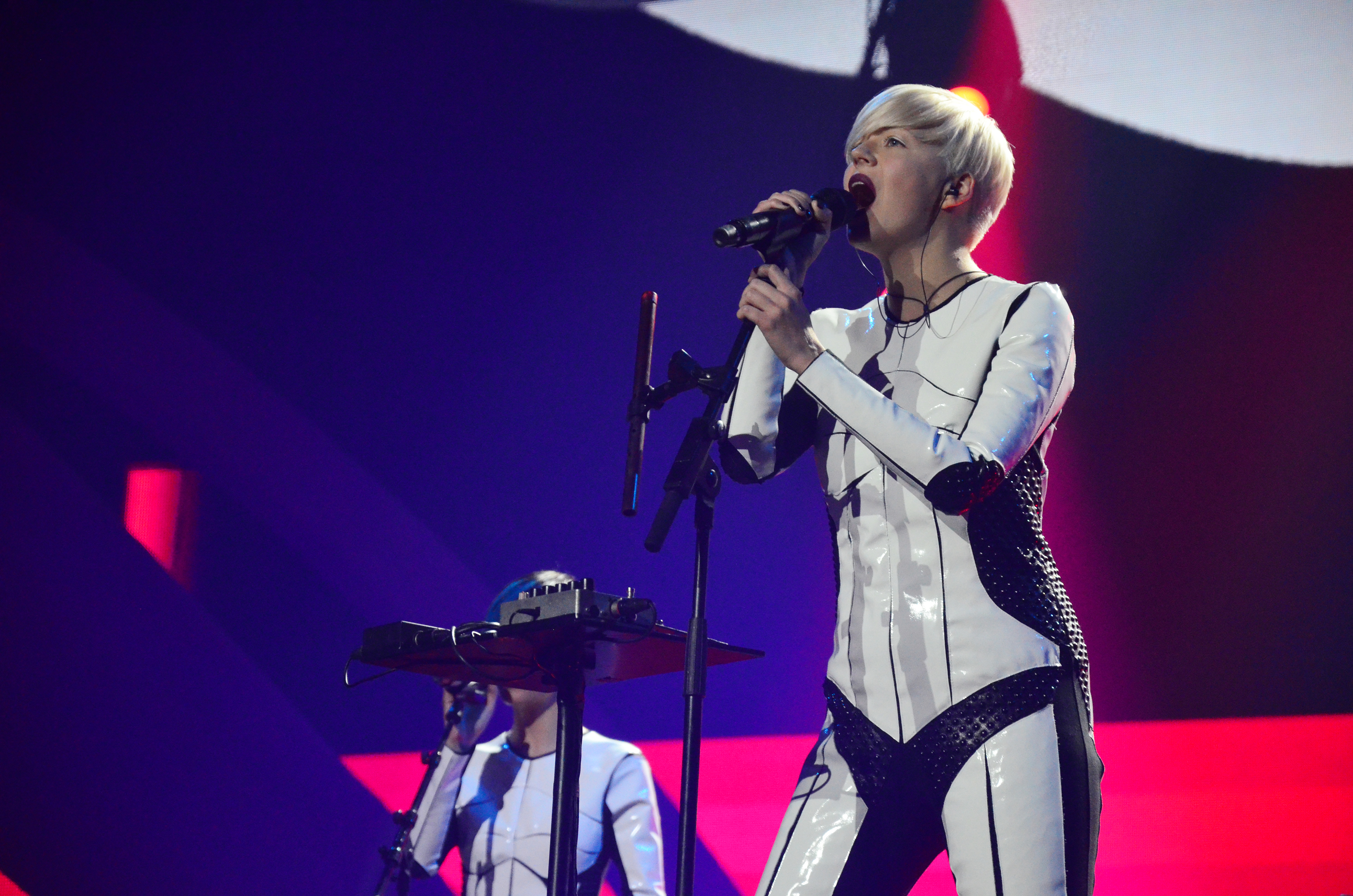 12 травня. Генеральна репетиція фіналу Євробачення 2017. Sunstroke Project (Moldova).